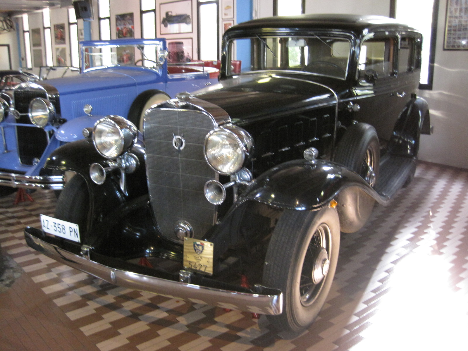 Automobiles in Panini Maserati Museum in Modène - Cadillac 355 Limousine - 1931 - (Country of origin: USA)